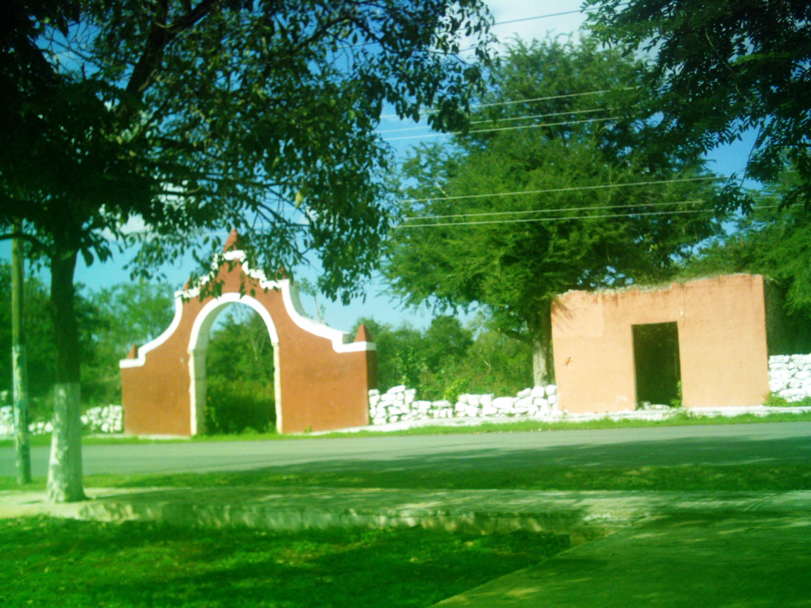 Hacienda de Dzibilchaltún, Yucatán.